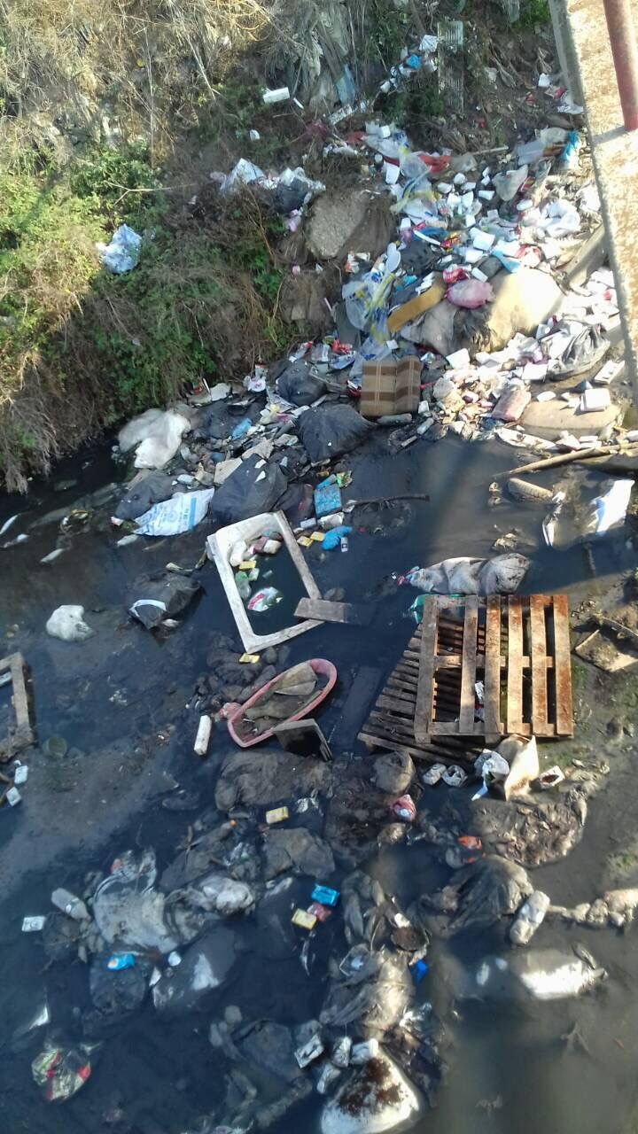 Bërlloku ndot ujin dhe tokën në Kosovë